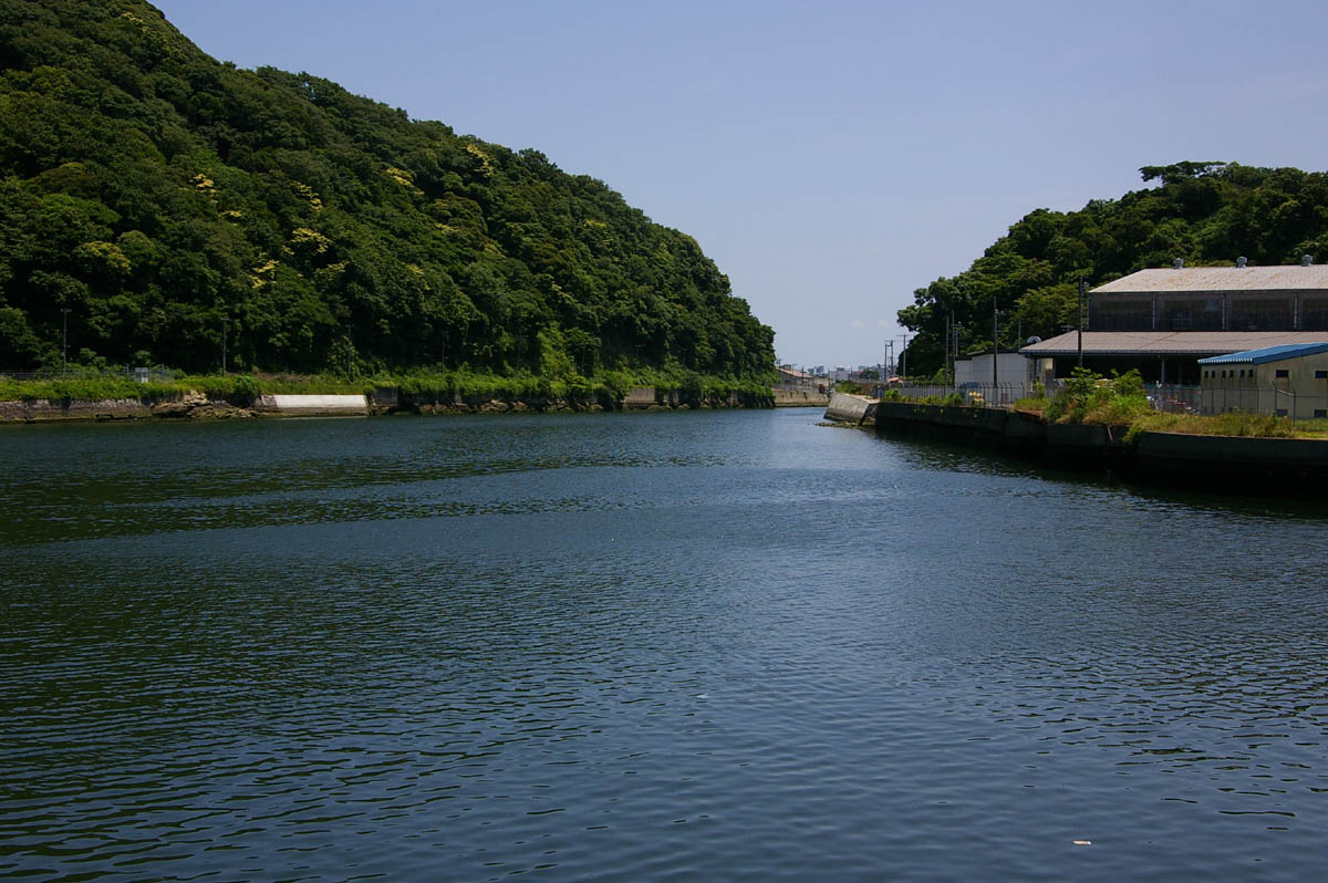 Araihoriwari Yokosuka,Japan 新井掘割 横須賀